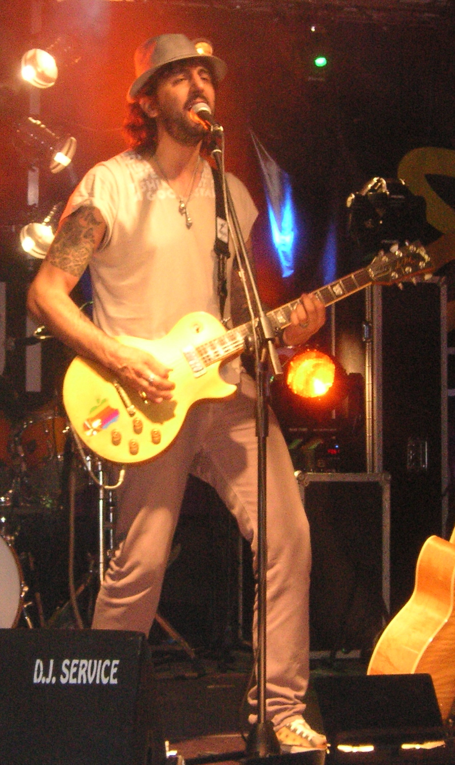 Omar Pedrini cantante italiano, in concerto a Trento